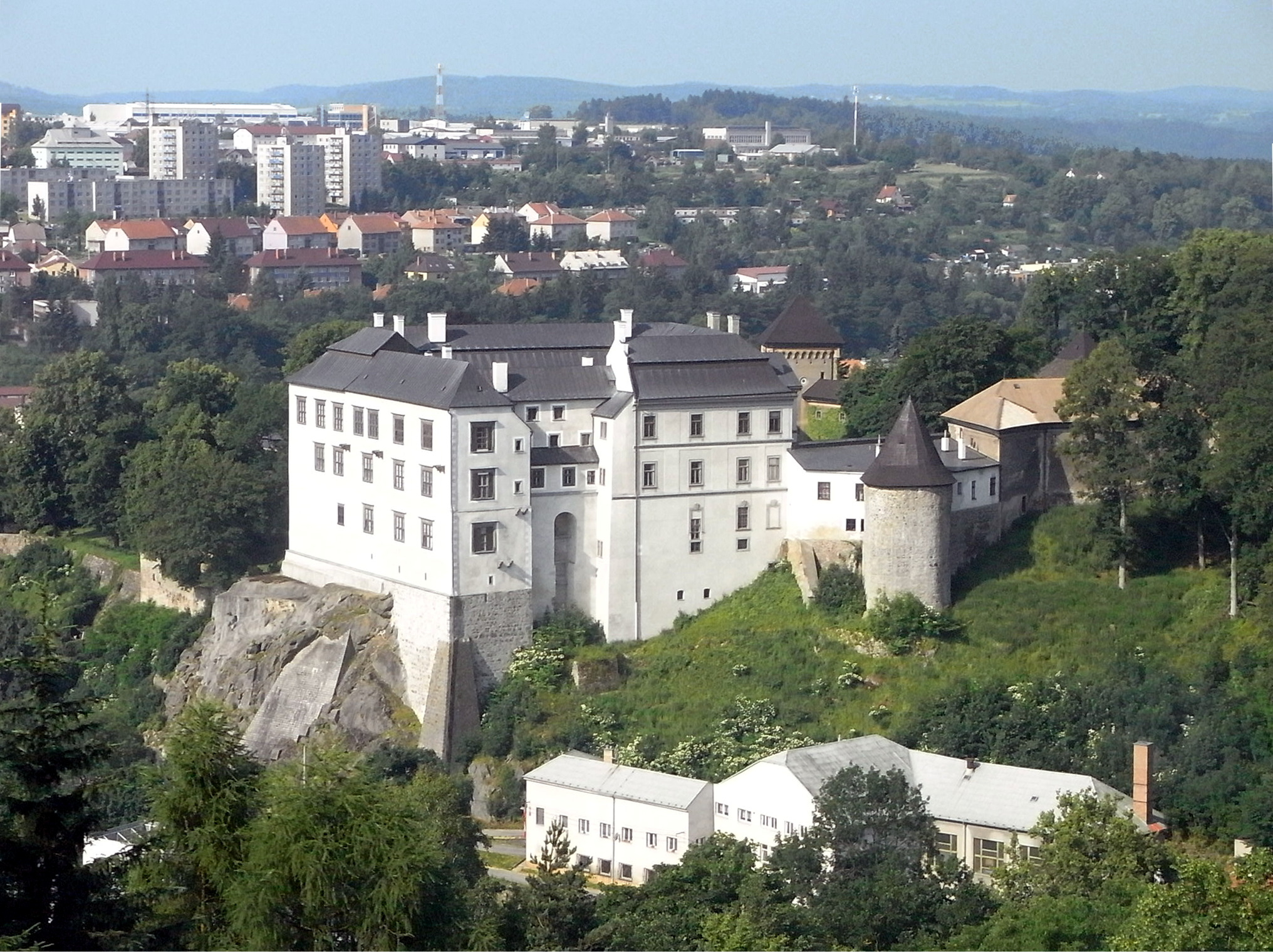 Renaissance-Schloss Velké Meziříčí (Groß Meseritsch, CZ).